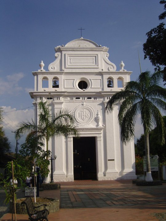 Bella iglesia de mucha antiguedad.